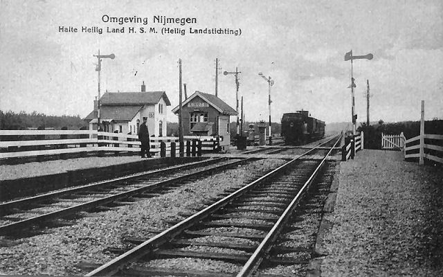 Station 't Heilig Land